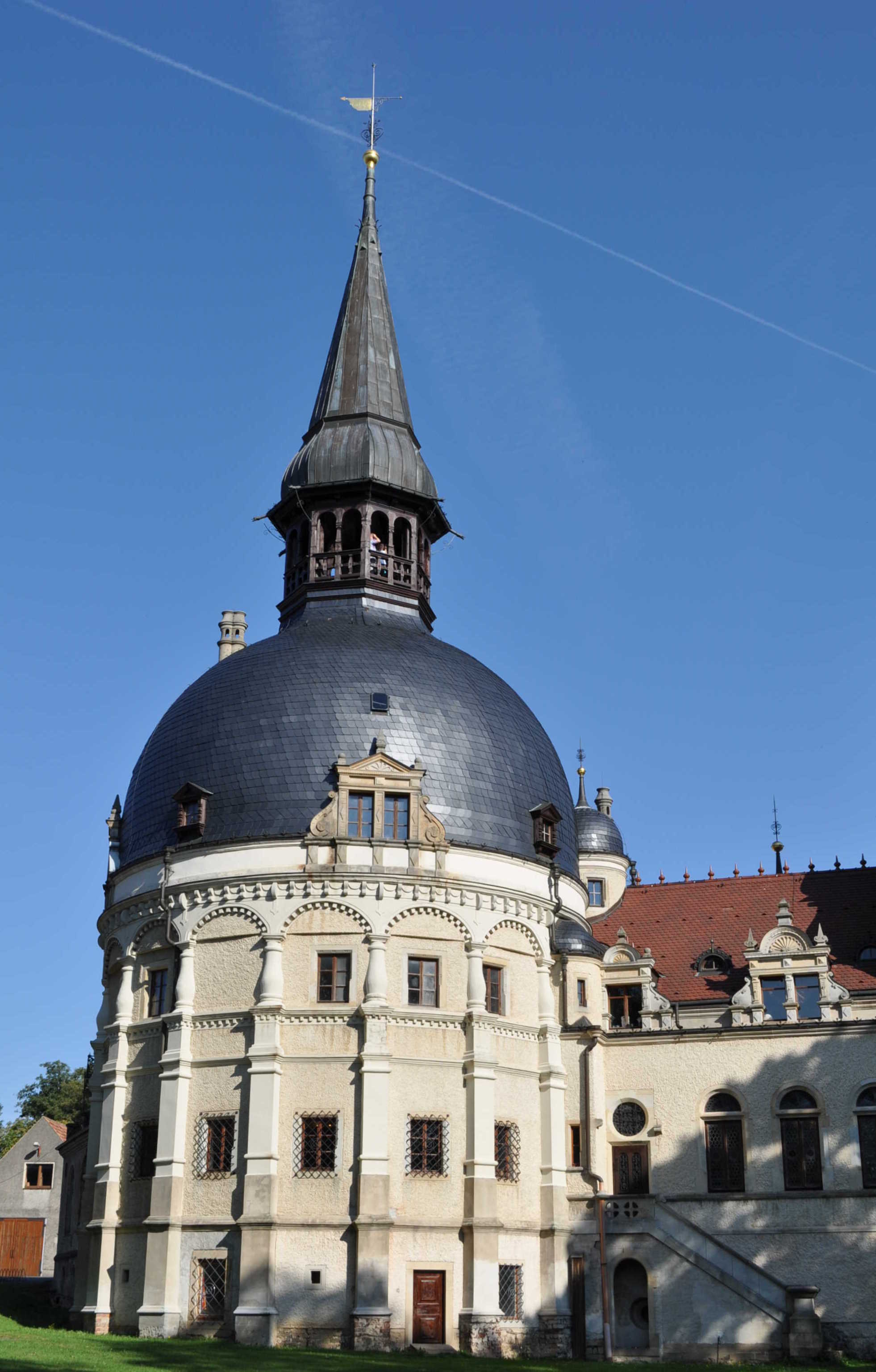 Schloss Schönfeld in der Gemeinde Schönfeld (Sachsen). Erstmals im 13. Jahrhundert urkundlich erwähnt und im Laufe der Jahrhunderte weiter ausgebaut. Es ist heute eines der bedeutendsten Neorenaissanceschlösser Sachsens.